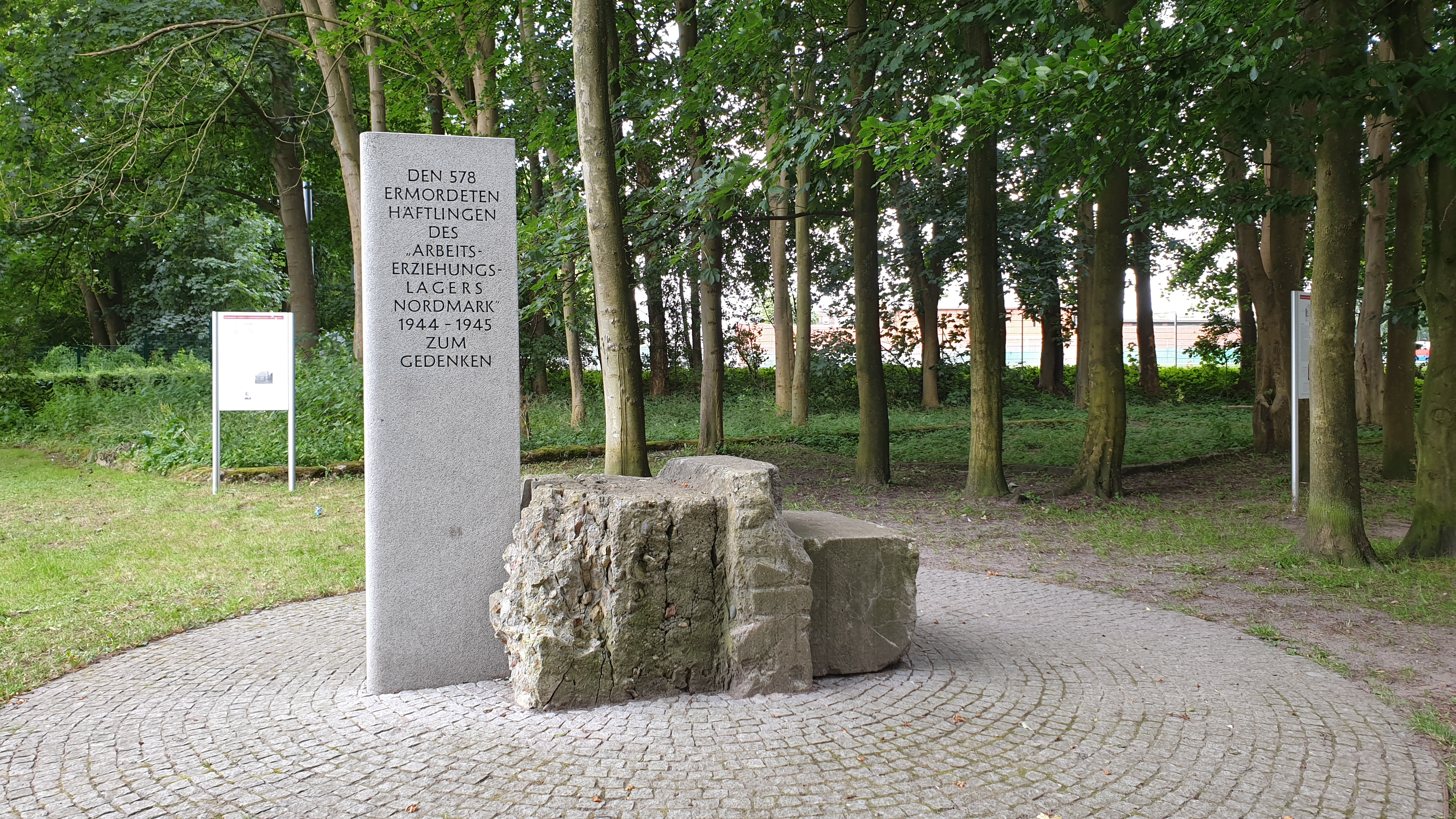 Platz um den Gedenkstein Arbeitserziehungslager Nordmark